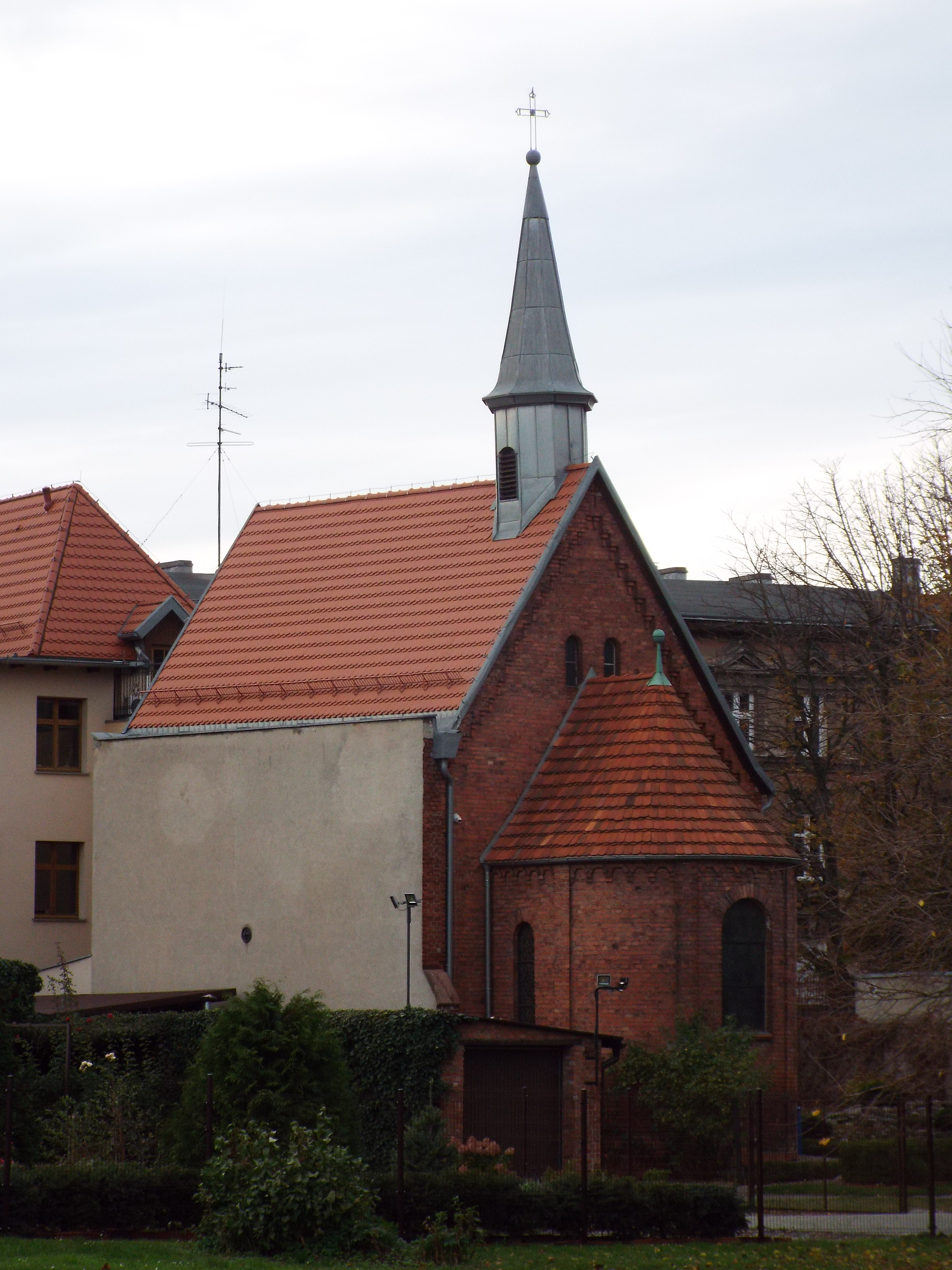 Elbląg, ul. Zamkowa 17 - kaplica wchodząca w skład zespołu dawnego klasztoru zgromadzenia ss. św. Katarzyny, 1910-12